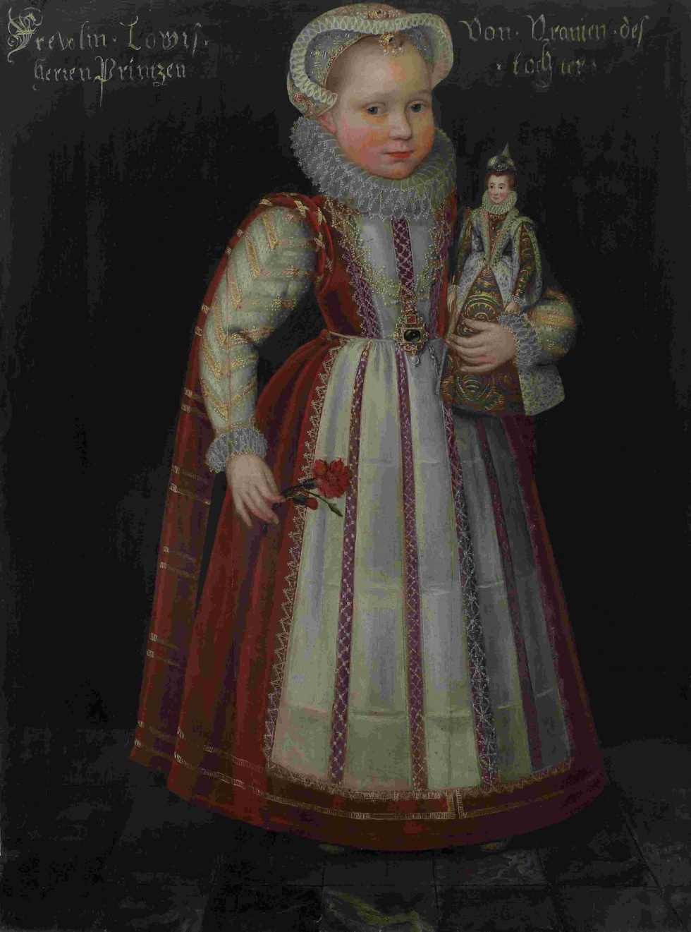 Porträt von Luise Juliane von Oranien-Nassau (1576-1644), Tochter von Wilhelm I. aus 3. Ehe mit Charlotte von Bourbon, im Alter von etwa 6 Jahren